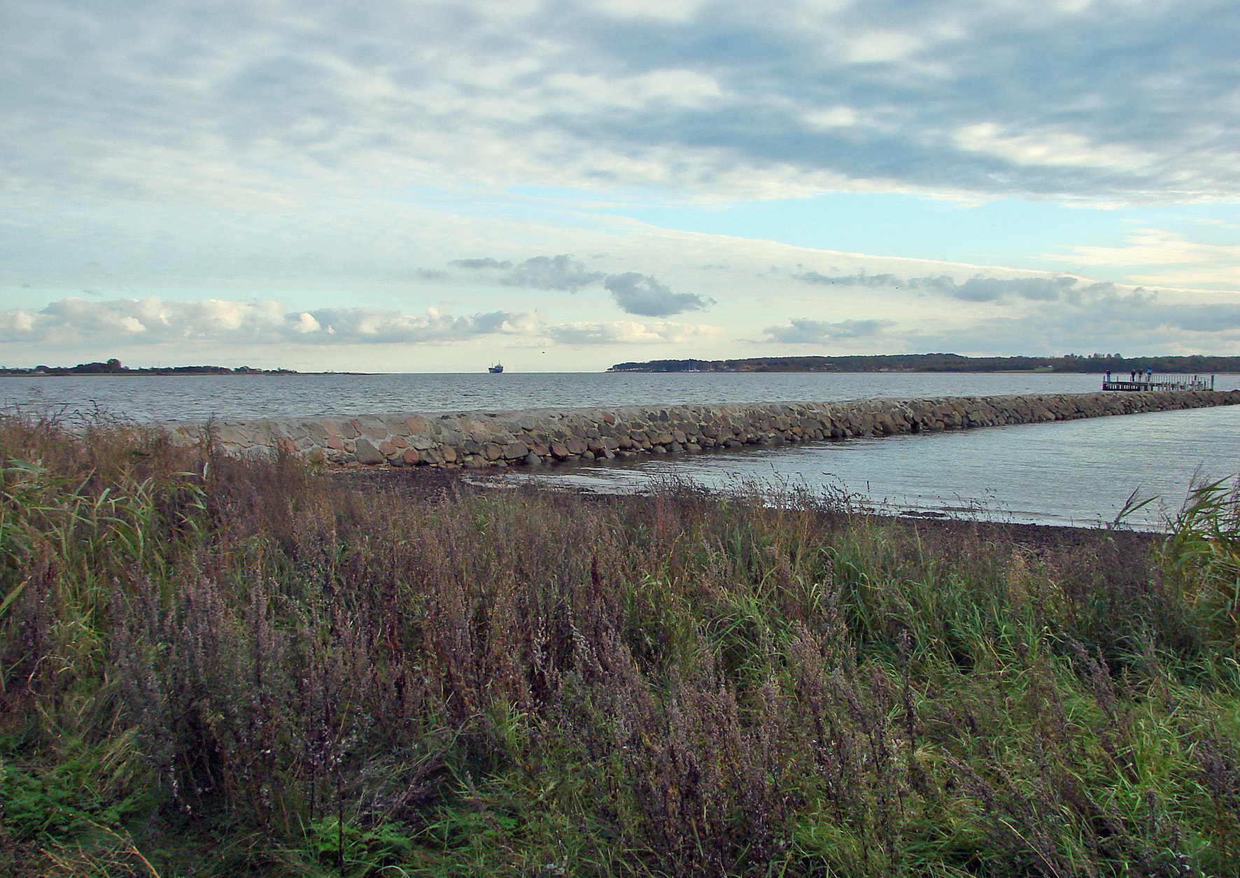 Horsens Fjord set fra Alrø mod øst; Hjarnø til venstre og Snaptun og Hundehage til højre.